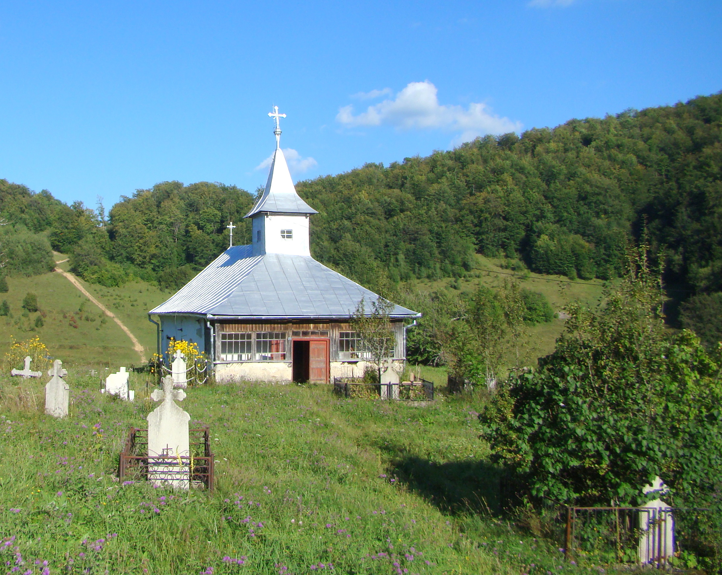 Biserica „Sf. Dumitru”, sat Poieni; comuna Vidra